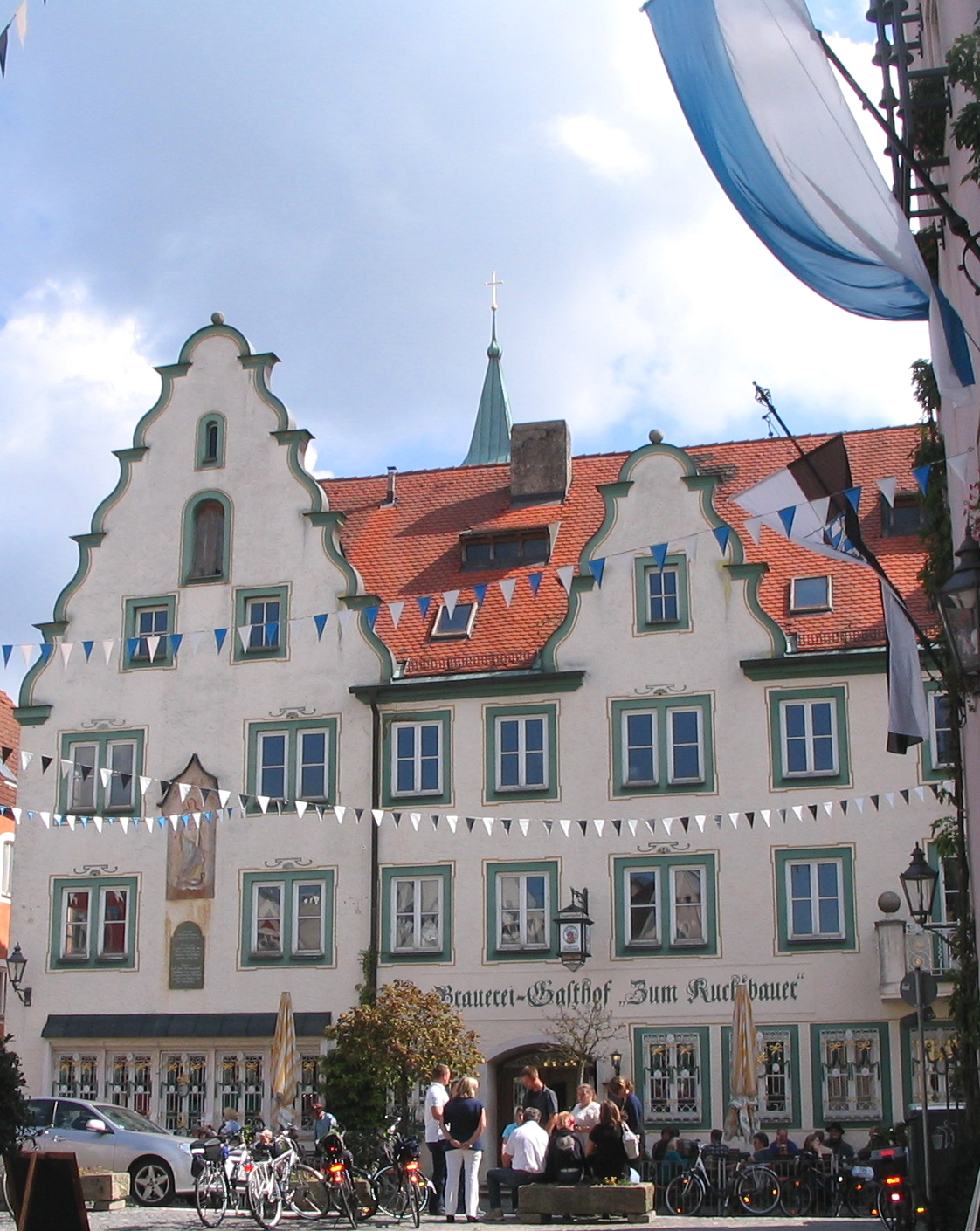 Gasthof zum Kuchlbauer am Stadtplatz Abensberg, Landkreis Kelheim, Niederbayern